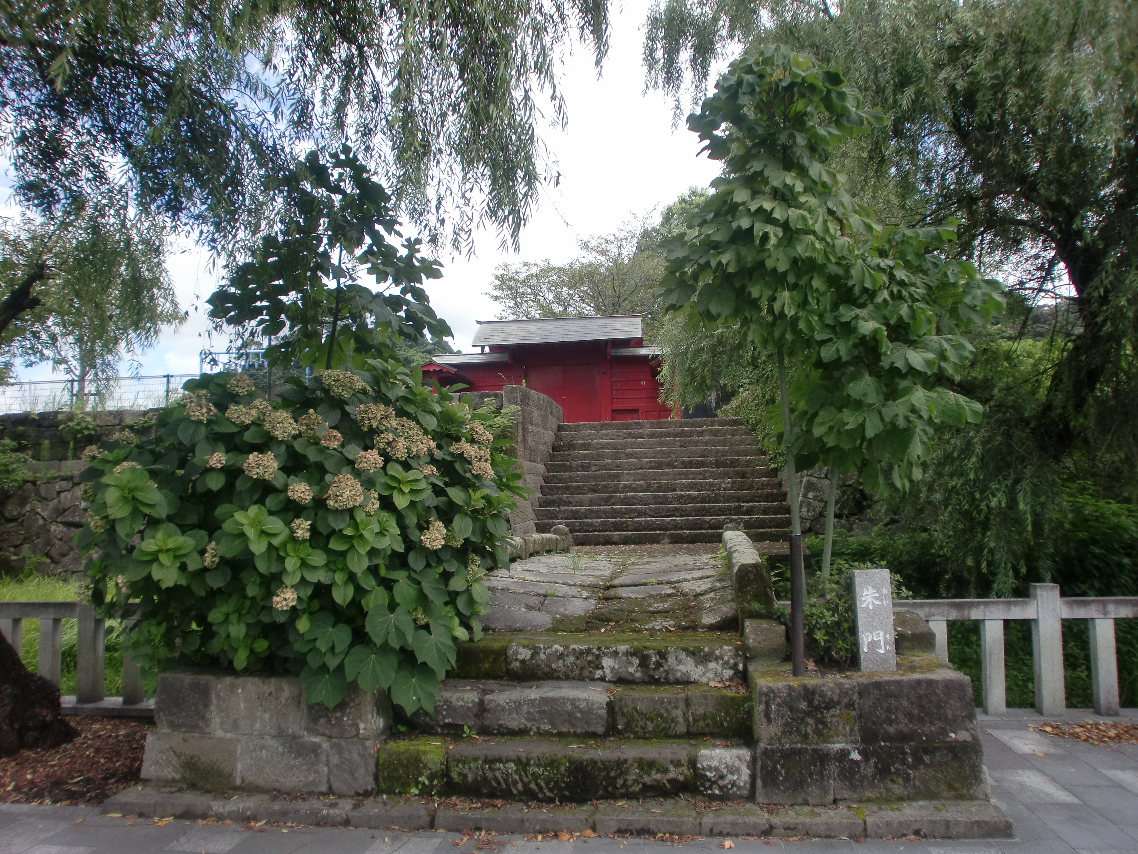 国分城の朱門の外観。